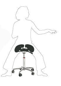 Проекционная схема посадки на стуле с седловидной поверхностью.